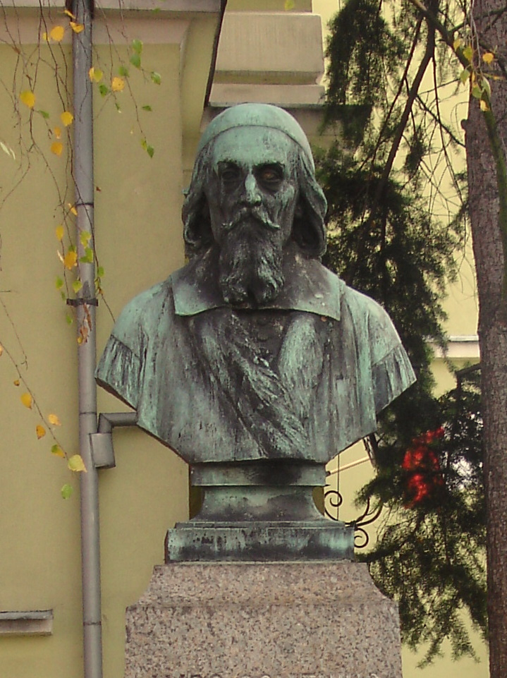 Popiersie Komeniusza na pomniku w Lesznie